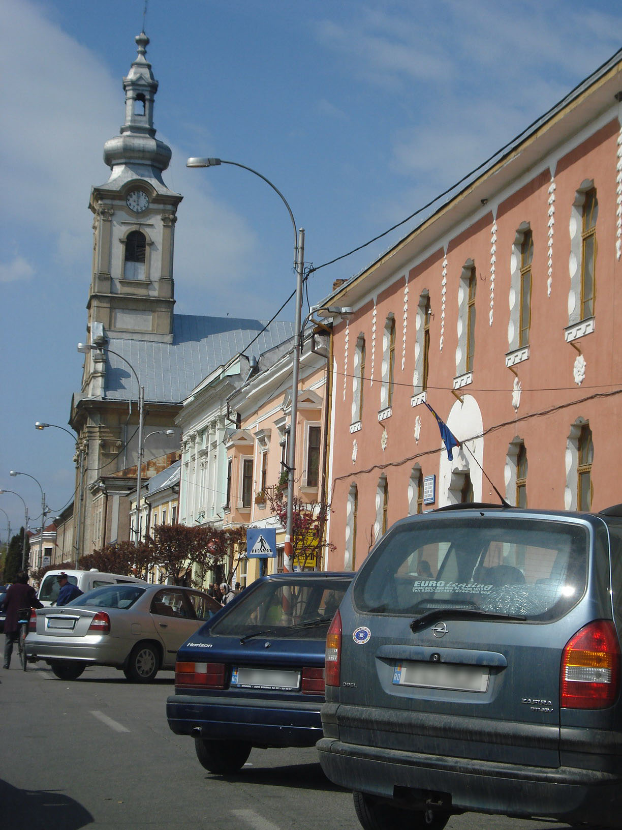 Sighetu Marmaţiei